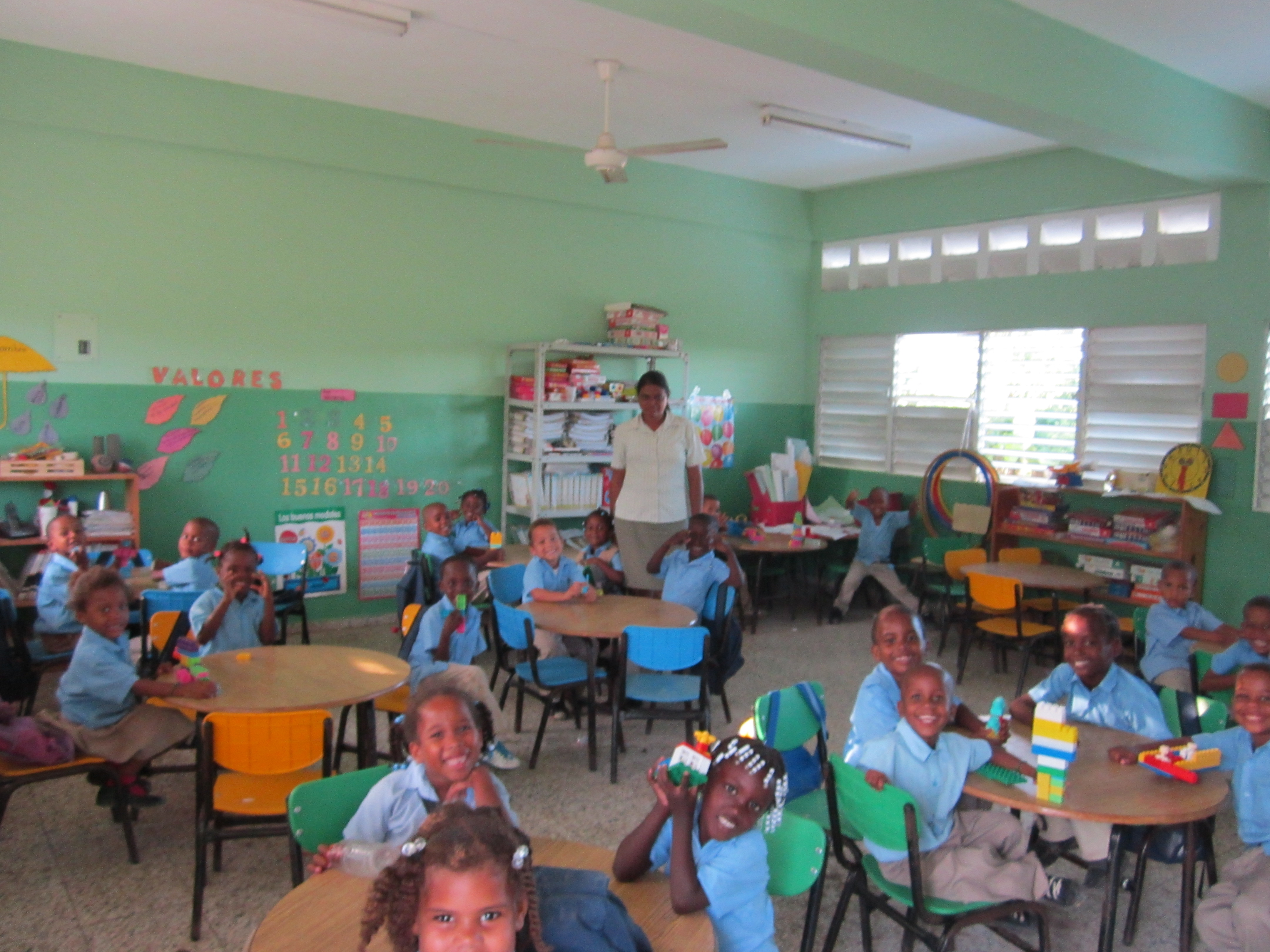 Sector 24 de abril en San Pedro de Macorís.